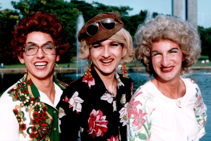 Teufelsberger im Jahr 1992